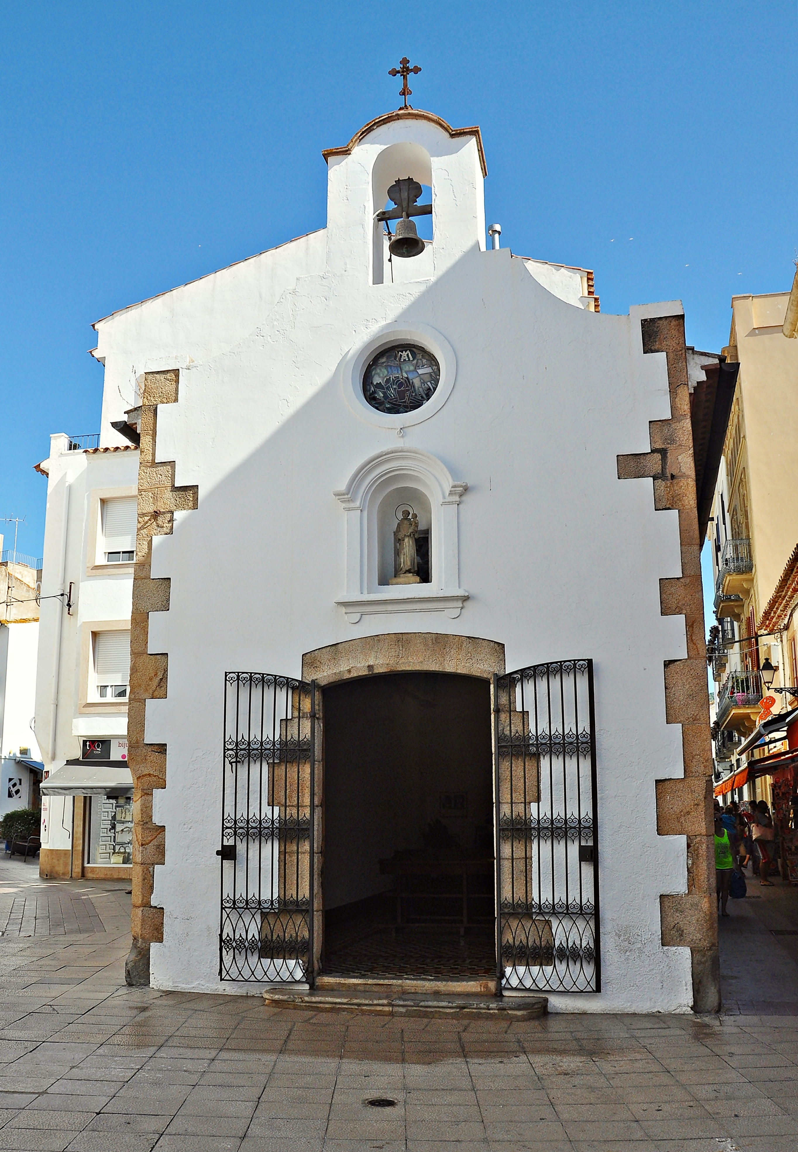 la selva-cataluña